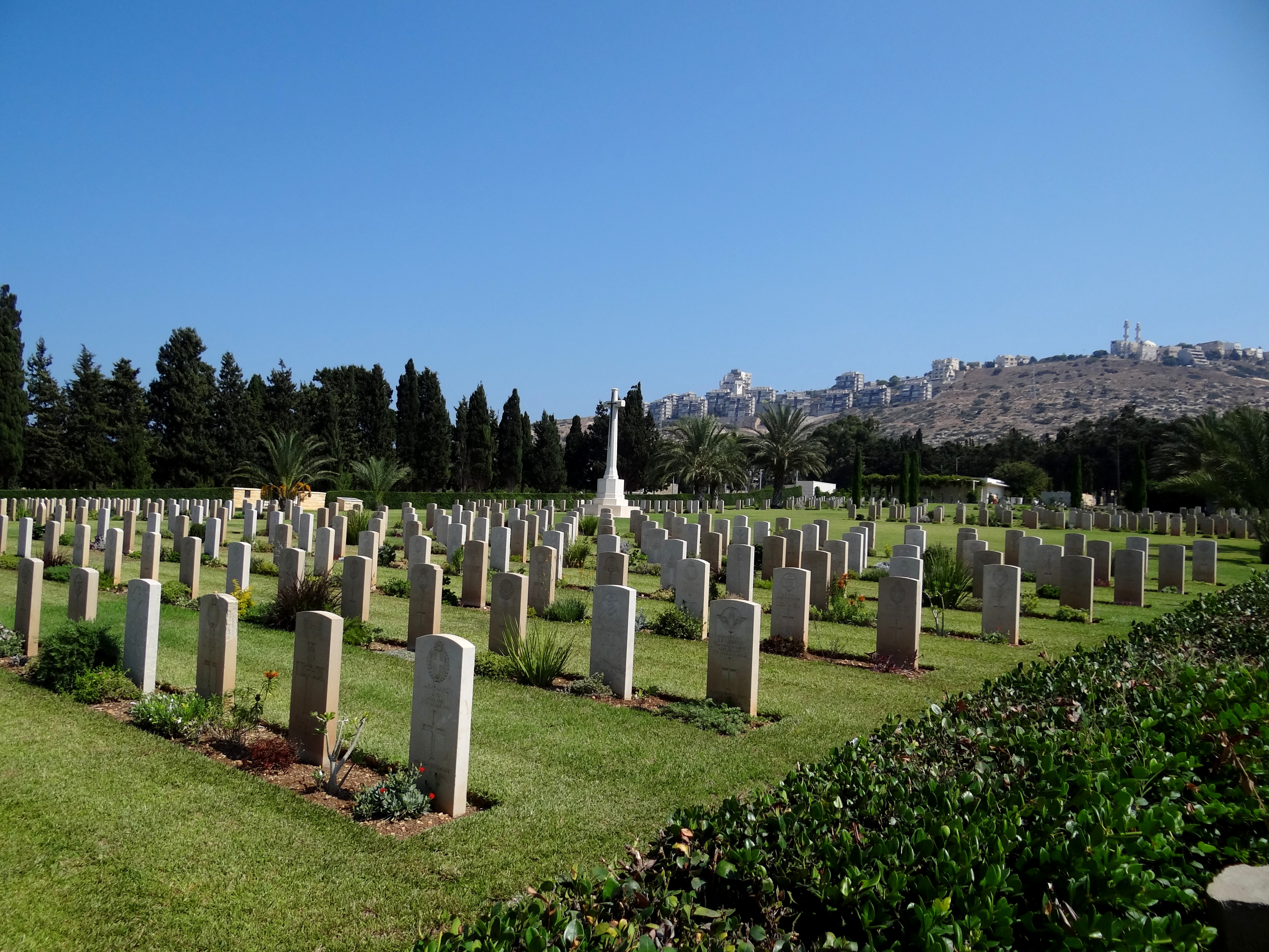 Khayat Beach War cemetery – Commonwealth war graves, Haifa Israel בית הקברות הצבאי חוף כיאט הוא בית קברות צבאי בריטי, השוכן במבואות הדרומיים של העיר חיפה. הוא הוקם בשנת 1941. טמונים בו 876 חללים.